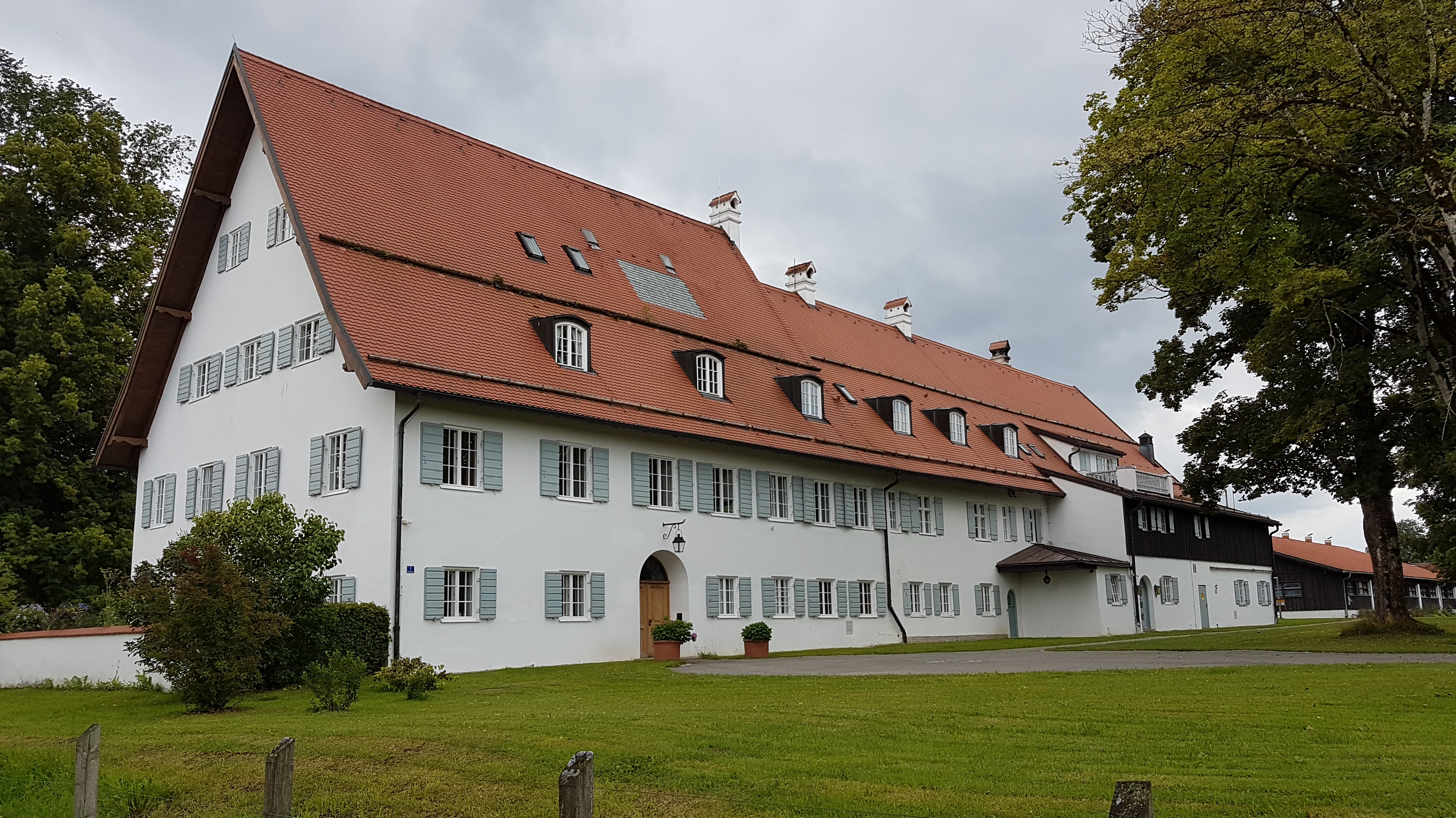 Gutshof